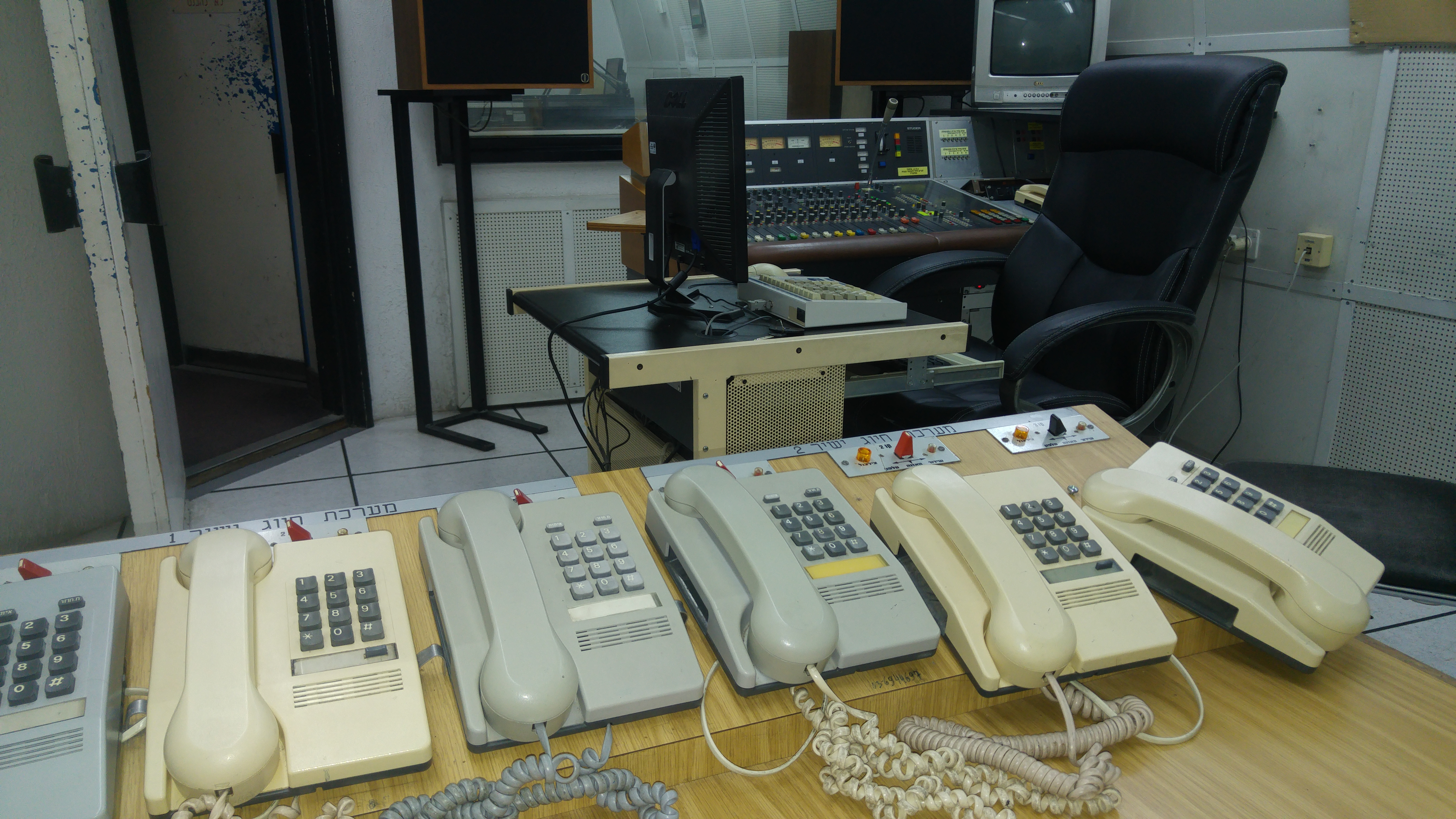 מתחם רשות השידור בתל אביב, ליד הקריה ומתחם שרונה.